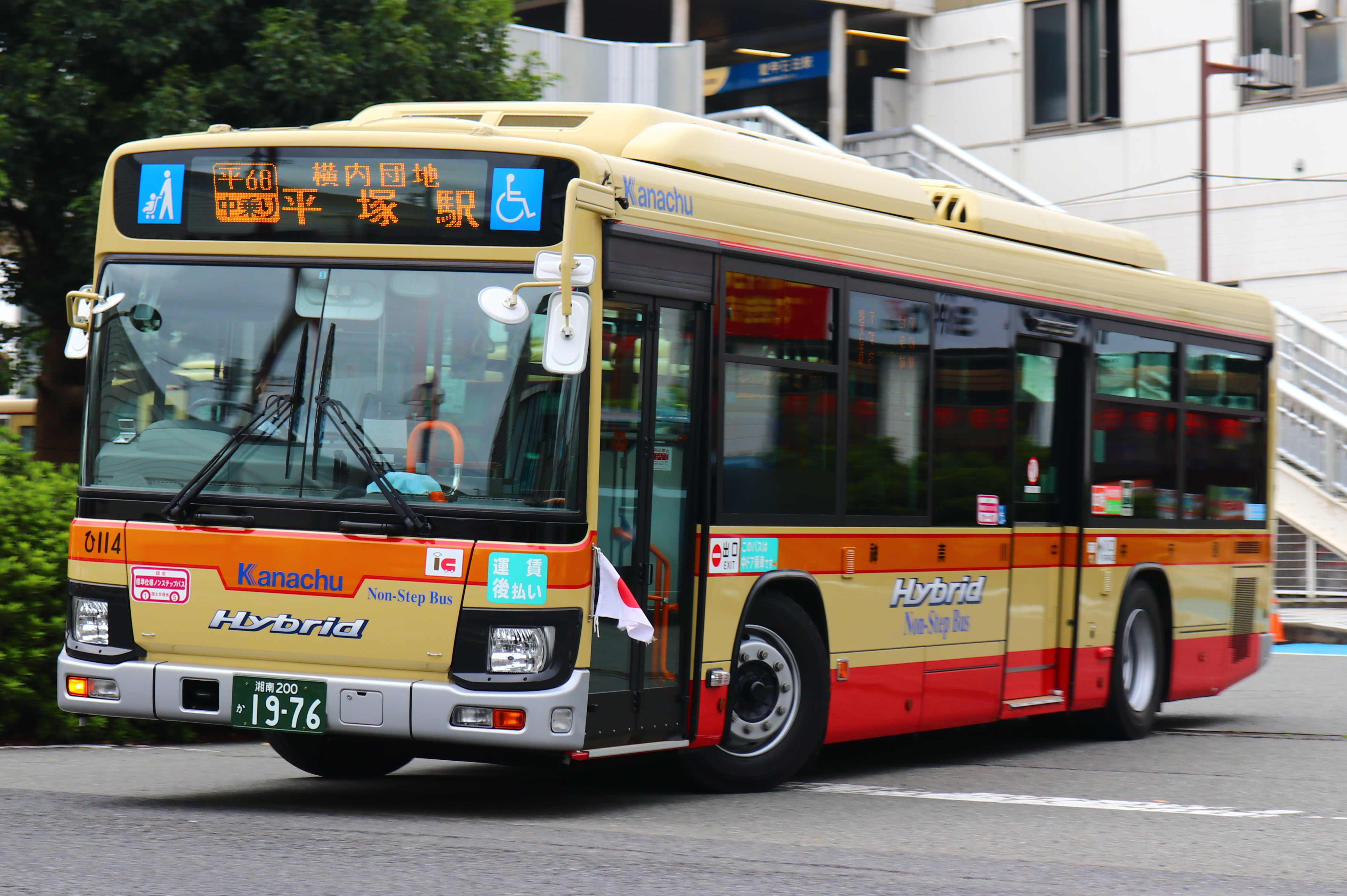 神奈川中央交通 平塚営業所ブルーリボン